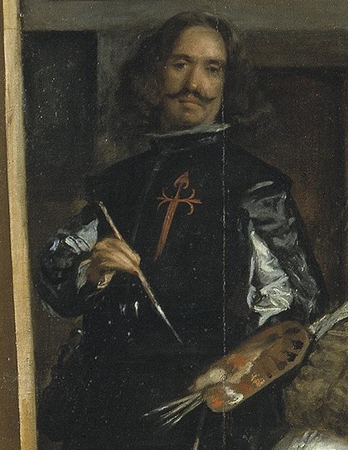 detail: Self-portrait Diego Velázquez